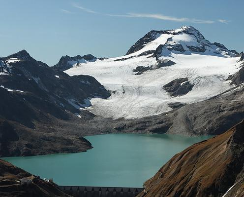 Ofenhorn vom Sabbiana-See aus